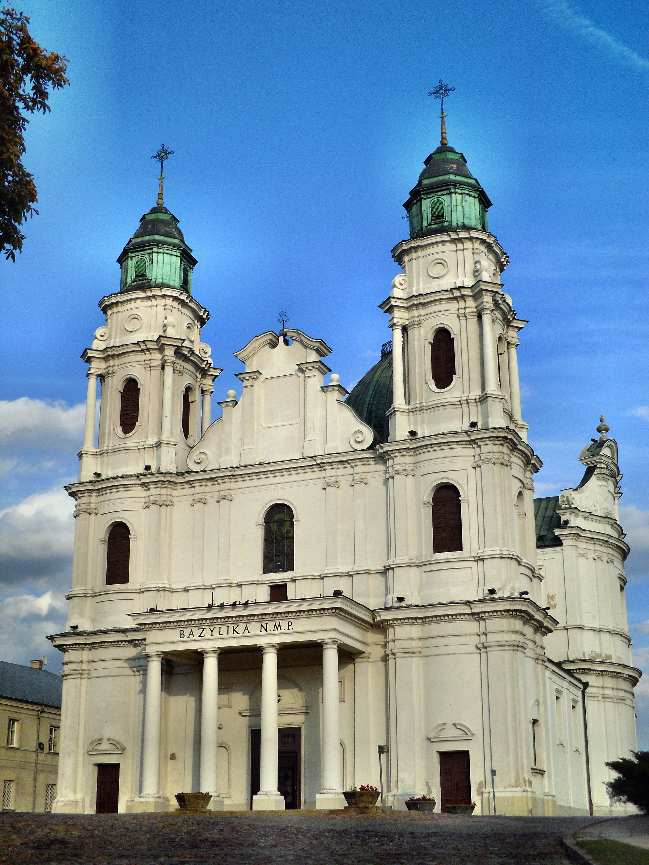 Bazylika NNMP w Chełmie